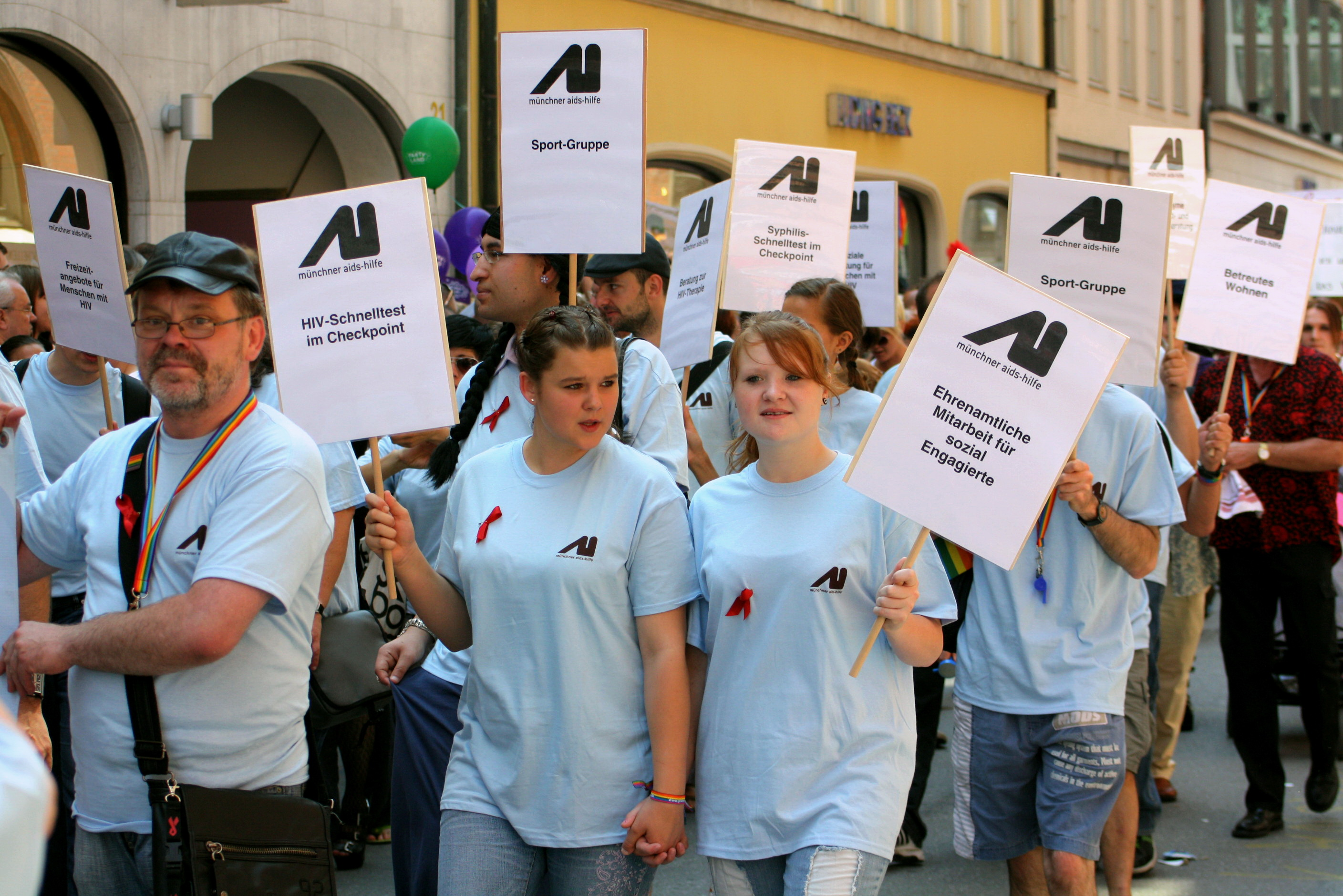 CSD 2011 in München - Gruppe der AIDS-Hilfe